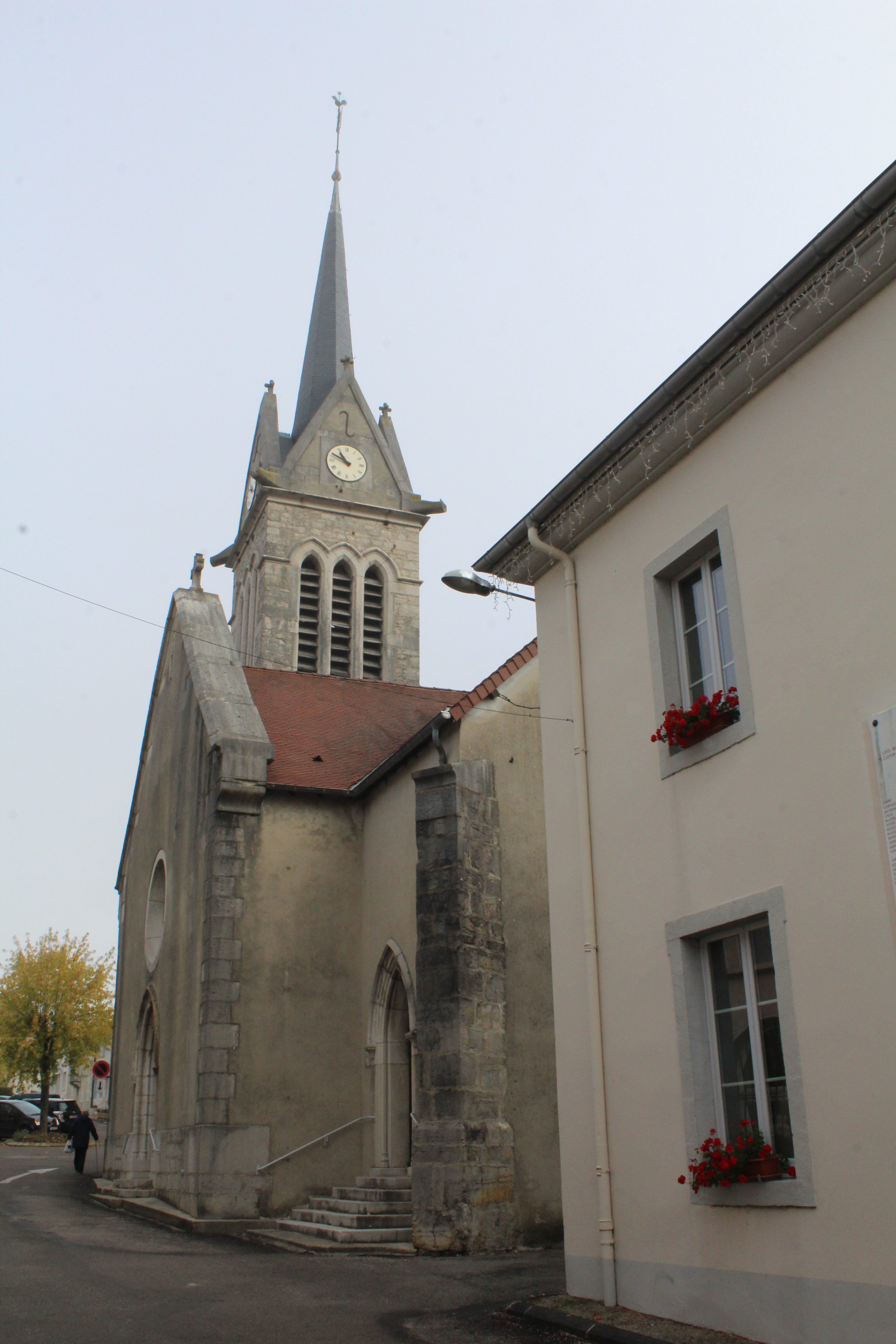 Église Saint-Jean-Baptiste de Saint-Julien, Val-Suran.